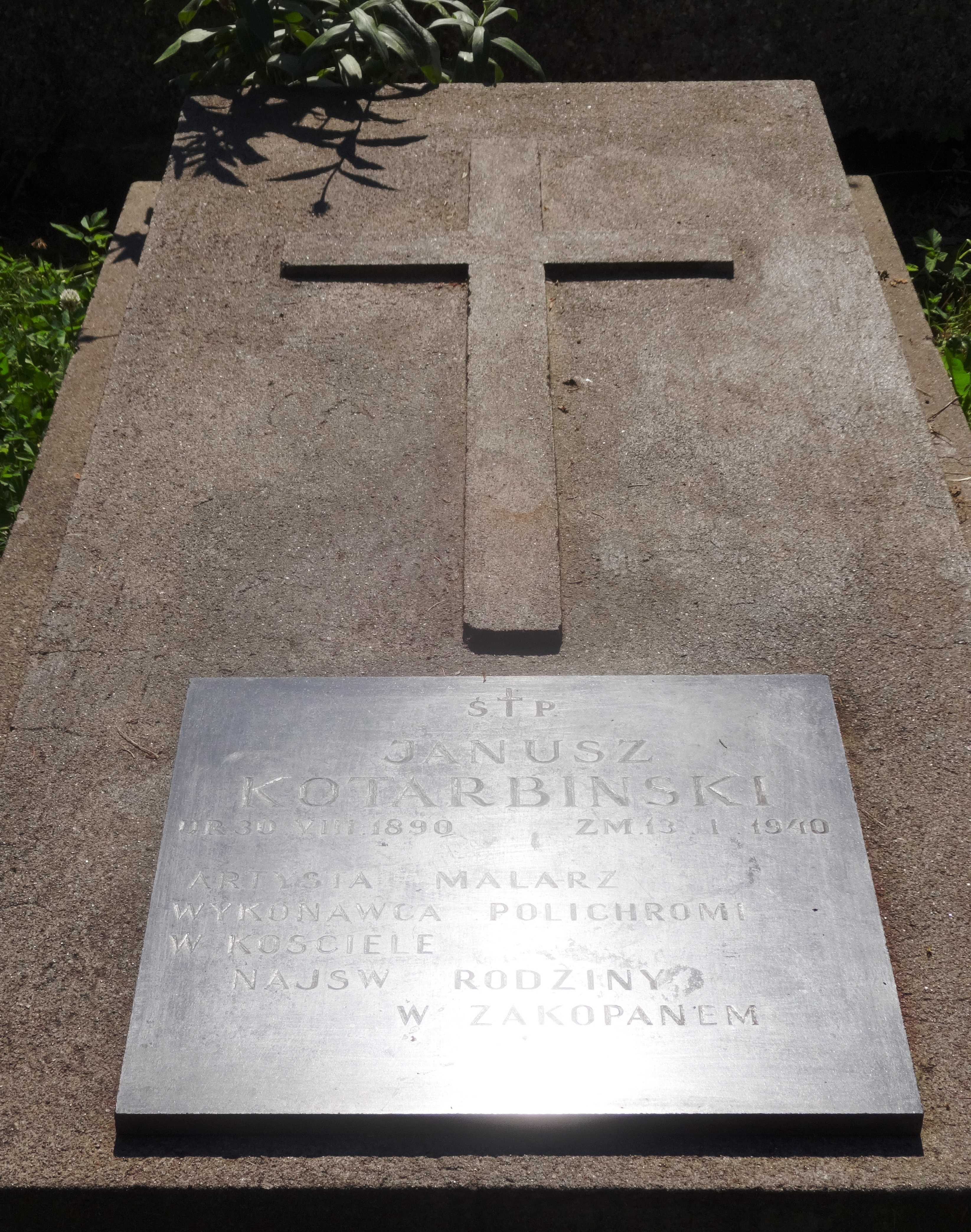 New Cemetery in Zakopane